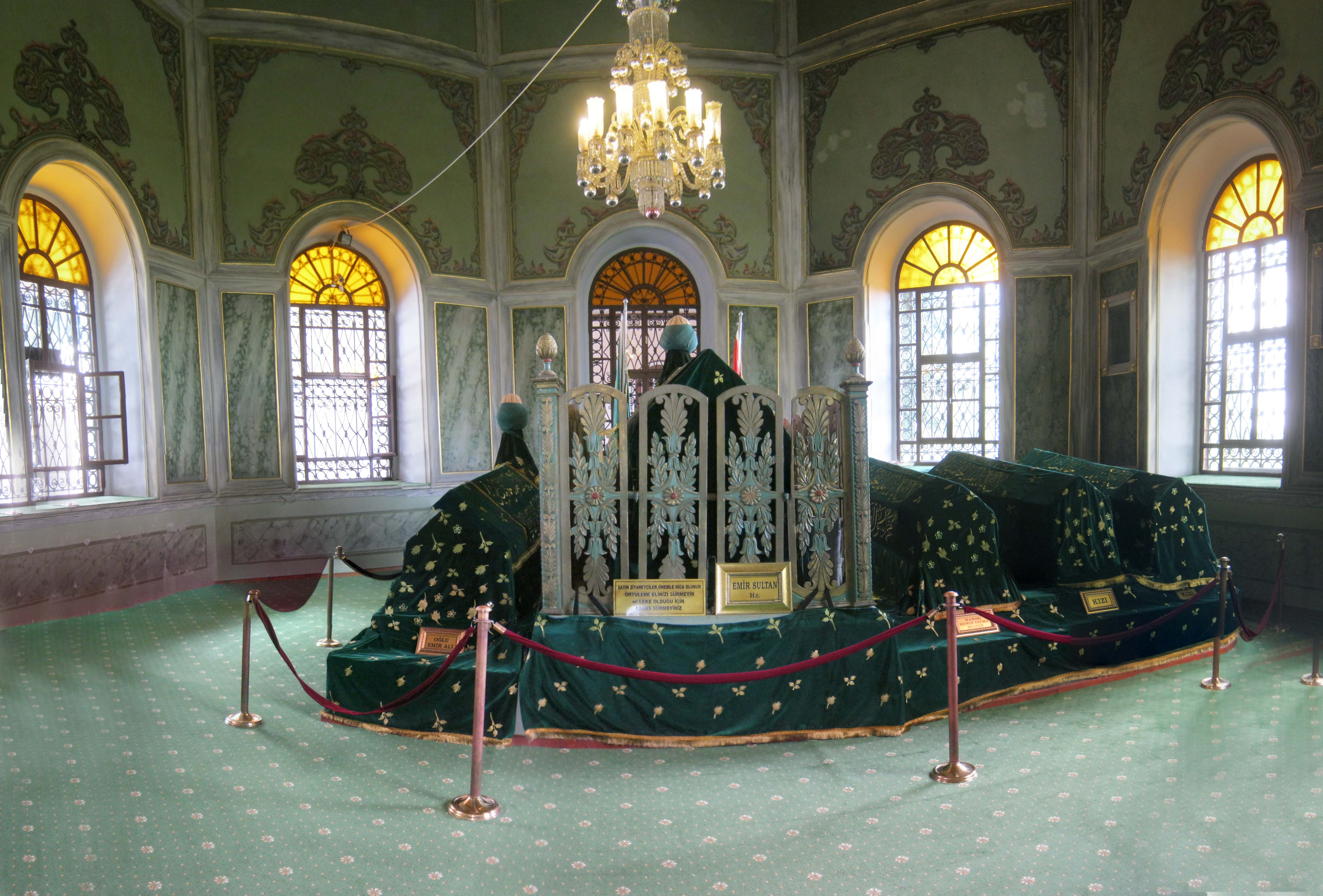 EMİRSULTAN HAZRETLERİNİN TÜRBESİ BURSA